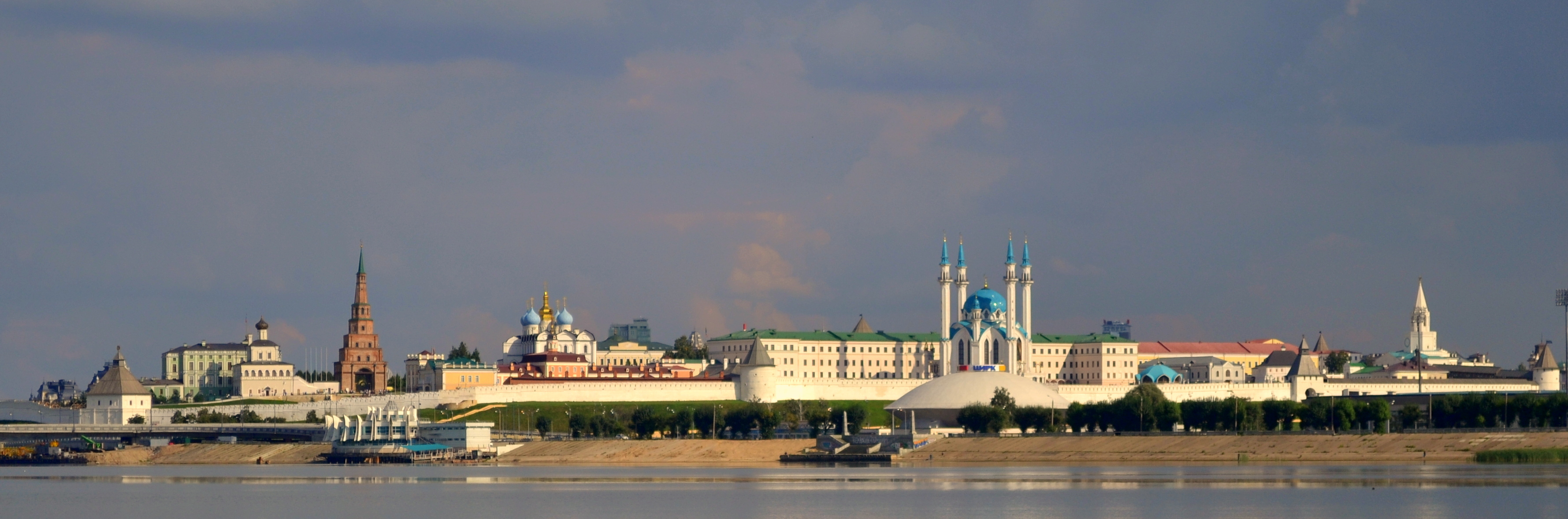 Ансамбль Казанского Кремля (Государственный историко-архитектурный и художественный музей-заповедник «Казанский Кремль») (Республика Татарстан, Казань, Кремль)